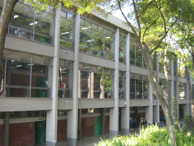 Salones de la Facultad de Contaduria y Administración donde alumnos y maestros comparten conocimiento